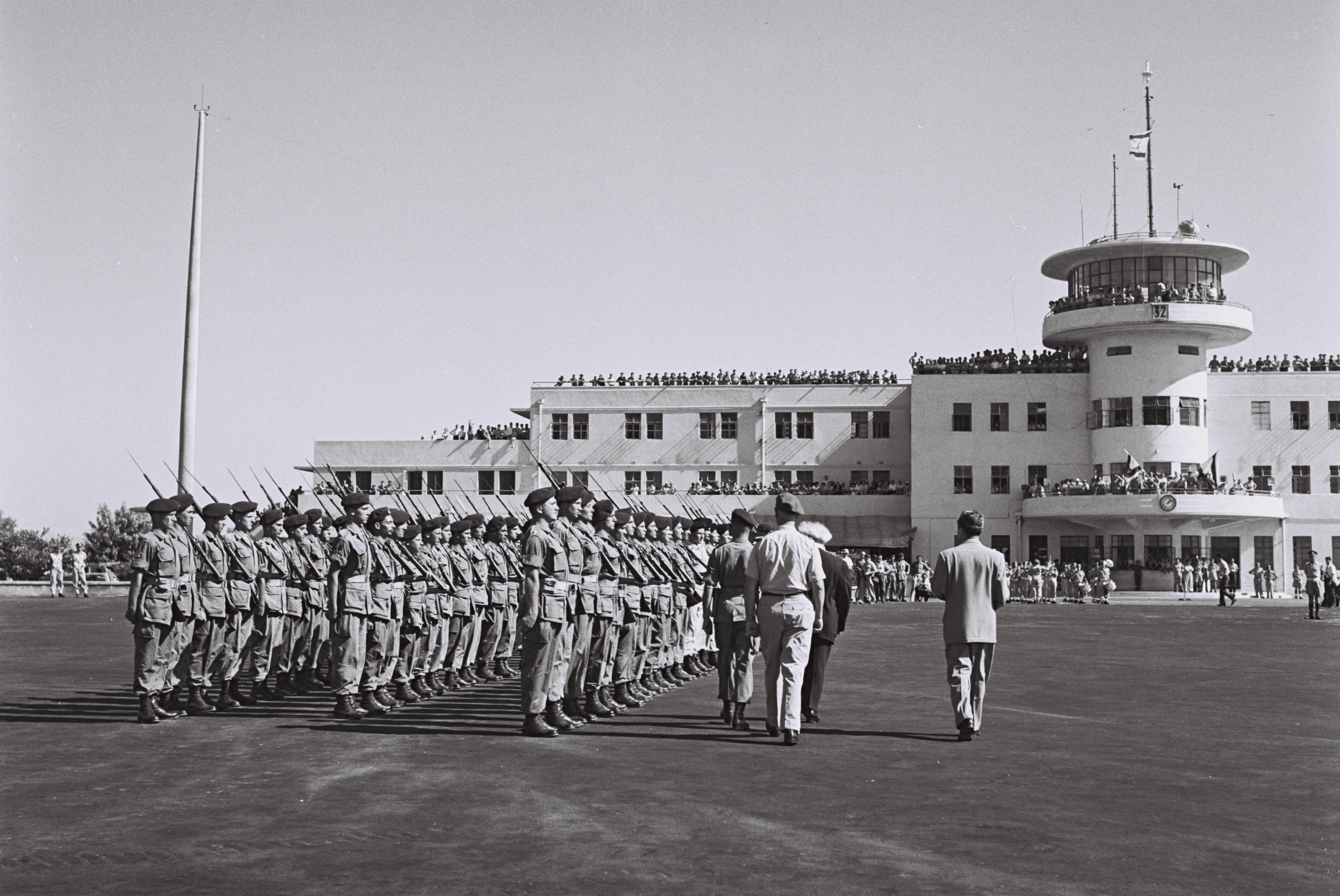 AN ARMY GUARD OF HONOR WAS DRAWN UP AT THE AIRPORT. PM DAVID BEN GURION INSPECTS THE GUARD. משמר כבוד של צה"ל בנמל התעופה בלוד, בטקס קבלת הפנים לראש הממשלה דוד בן גוריון לאחר חזרתו מביקור בארה"ב.